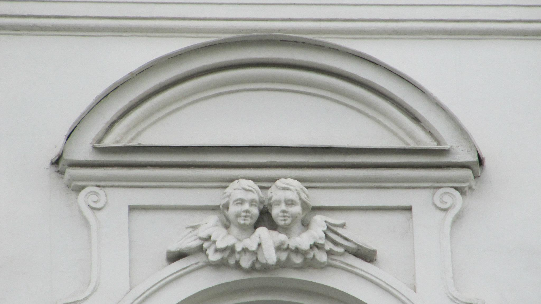 ул.Квитки-Основьяненко, 2